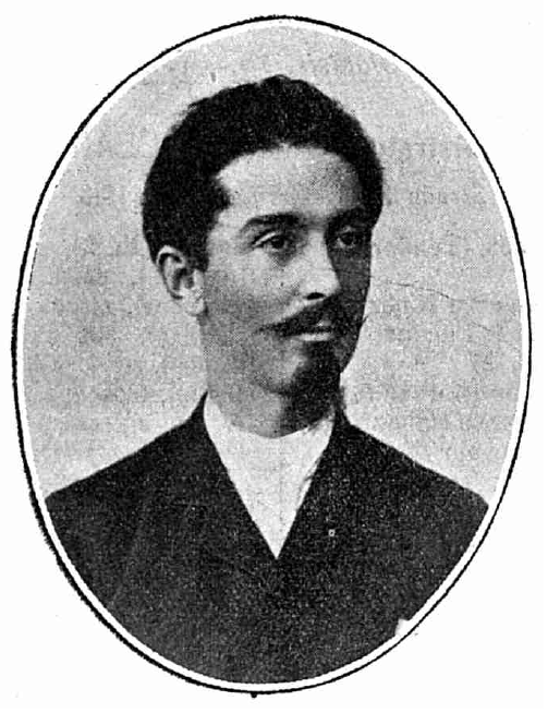 Alexandru Djuvara - ministrul afacerilor străine, România, 1910